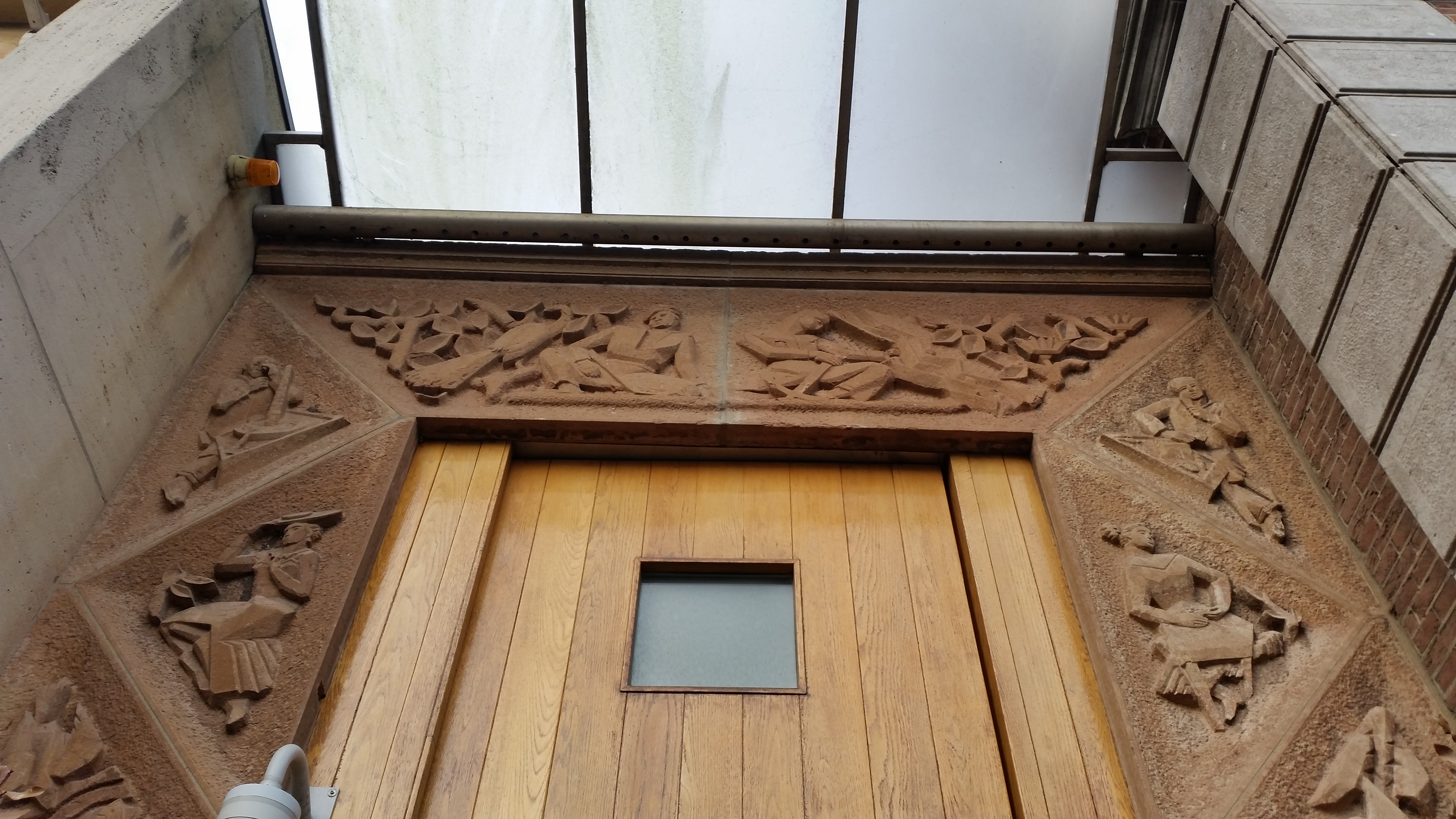 Reliëfs van George van der Wagt op Sarphatikade 12a, Amsterdam